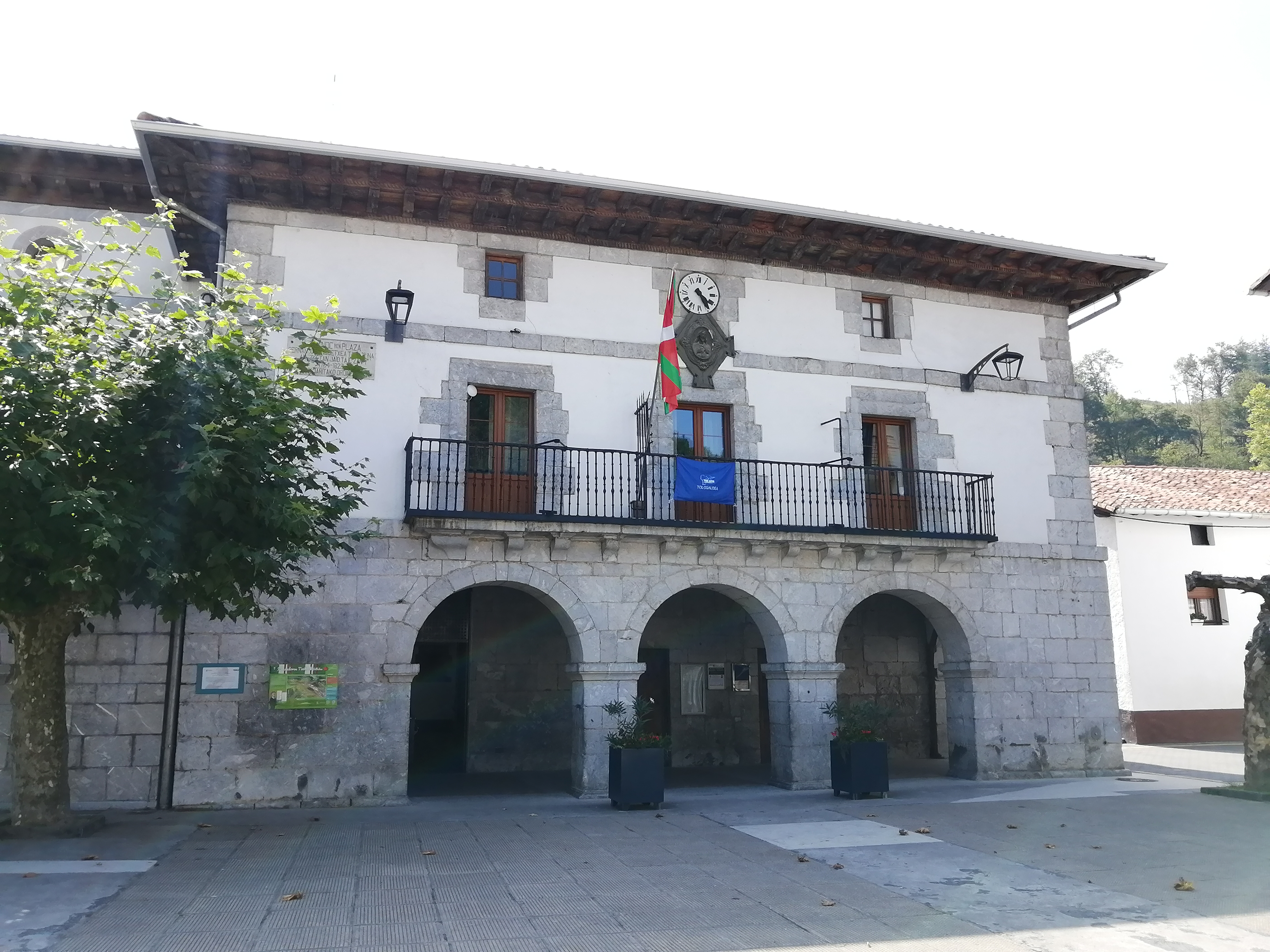 Amezketako udaletxea